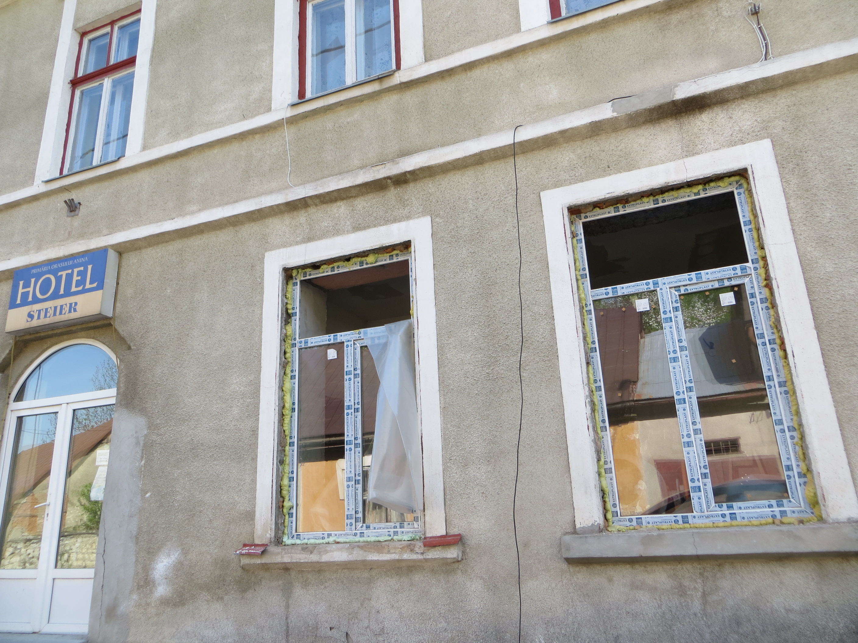 Casa Oficiului, azi hotel